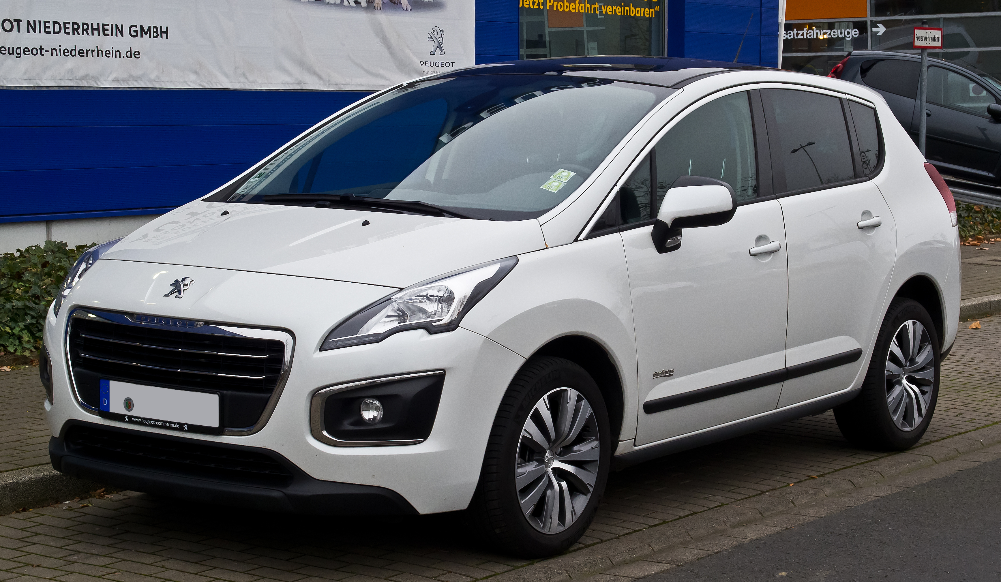 Peugeot 3008 Business-Line (Facelift)